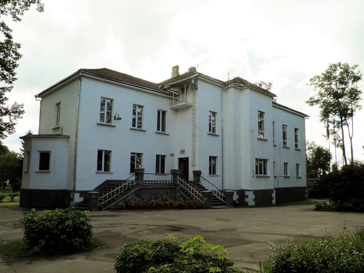 la municipalitéLatviešu: Rites pagasta pašvaldība (1)